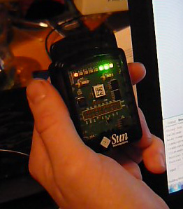 Sun SPOT sensor module